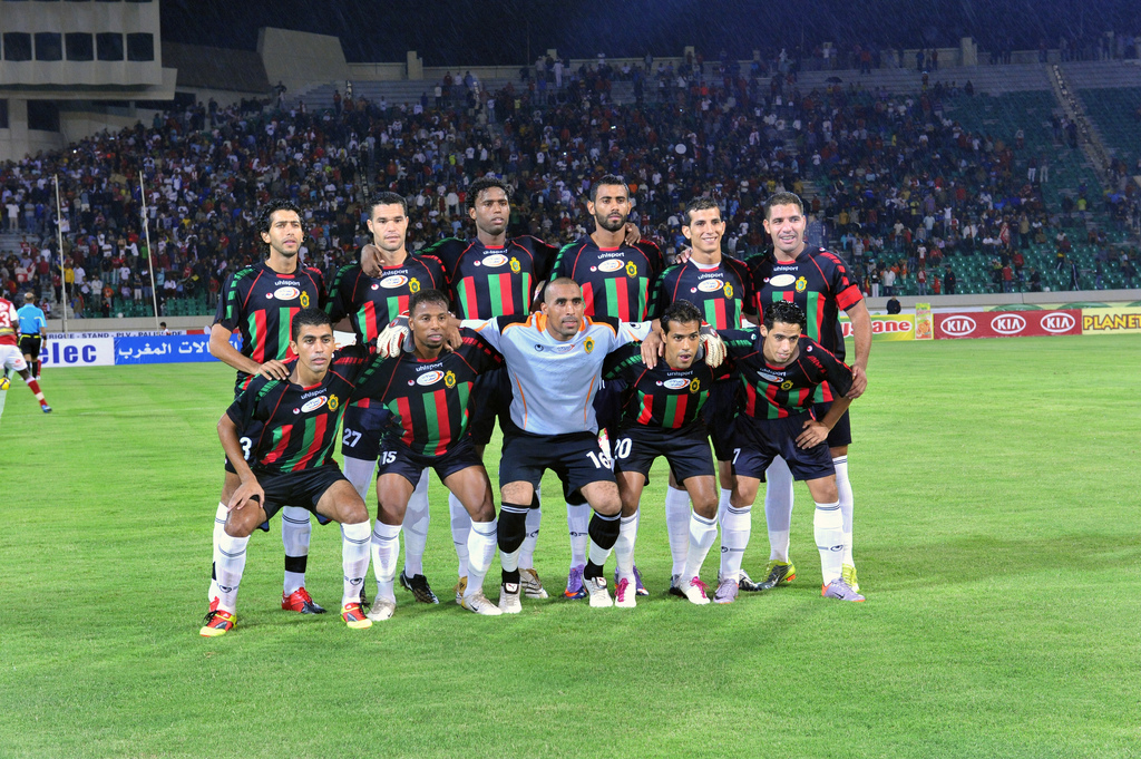 Équipe des FAR saison 2010-2011